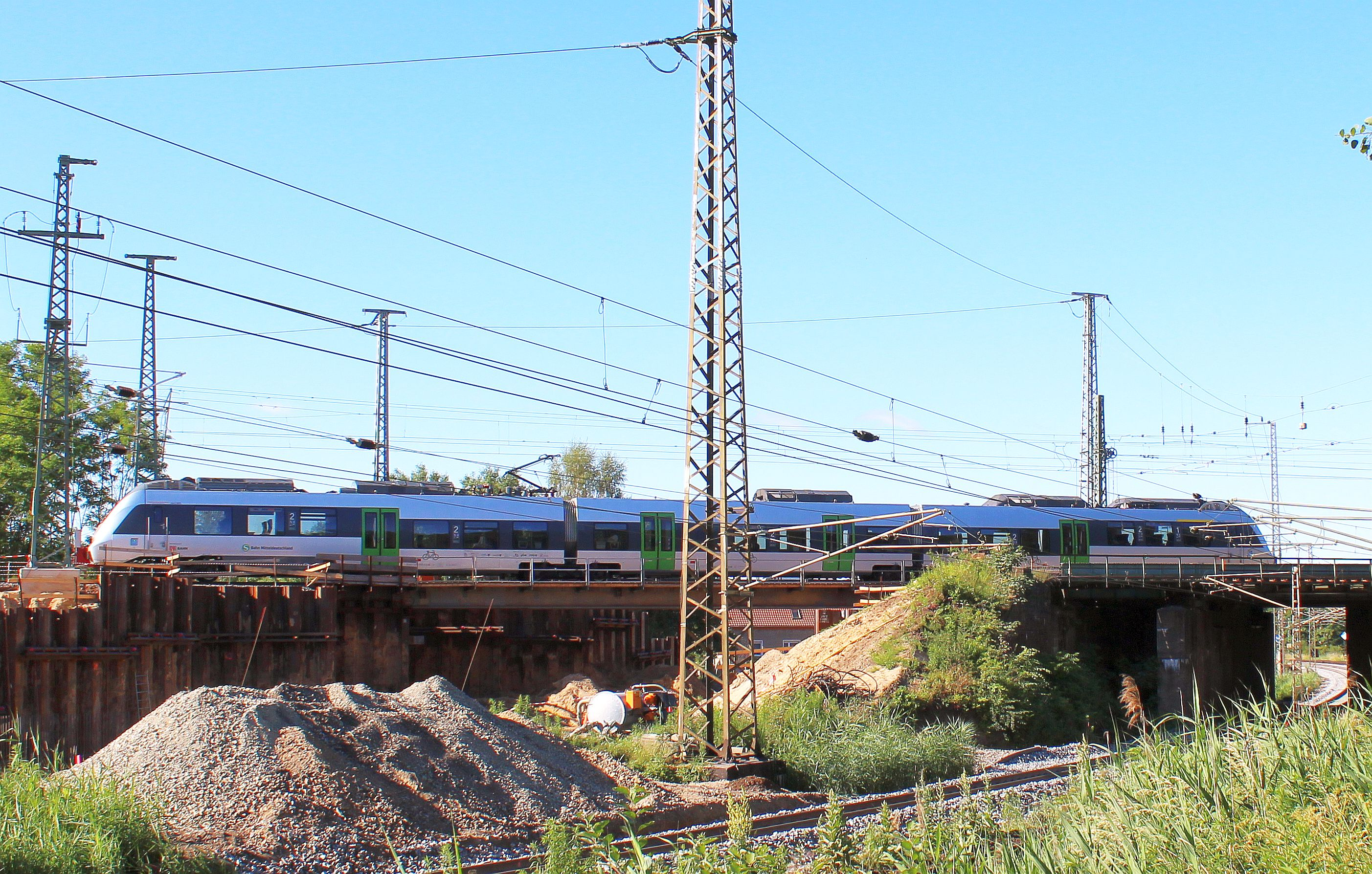 Kreuzungsbauwerk im Bereich des Bahnhofs Elsterwerda-Biehla.